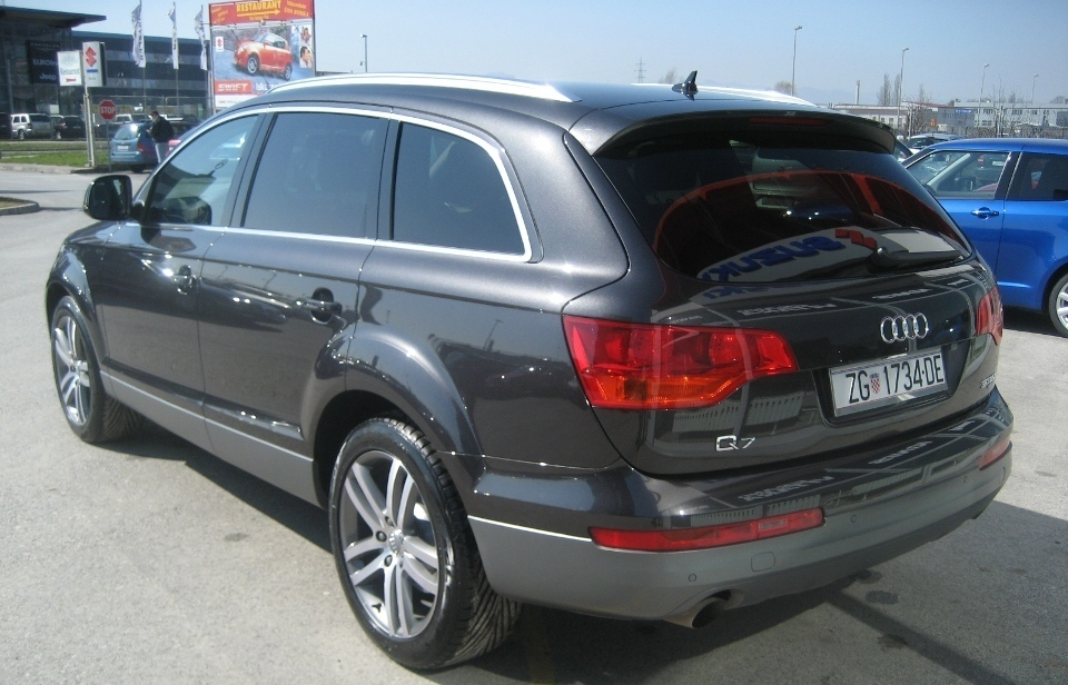 Audi Q7